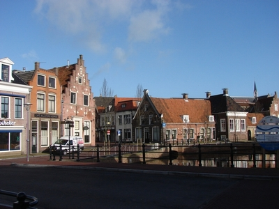 Nedersaksies: Sneek_anzicht.jpg